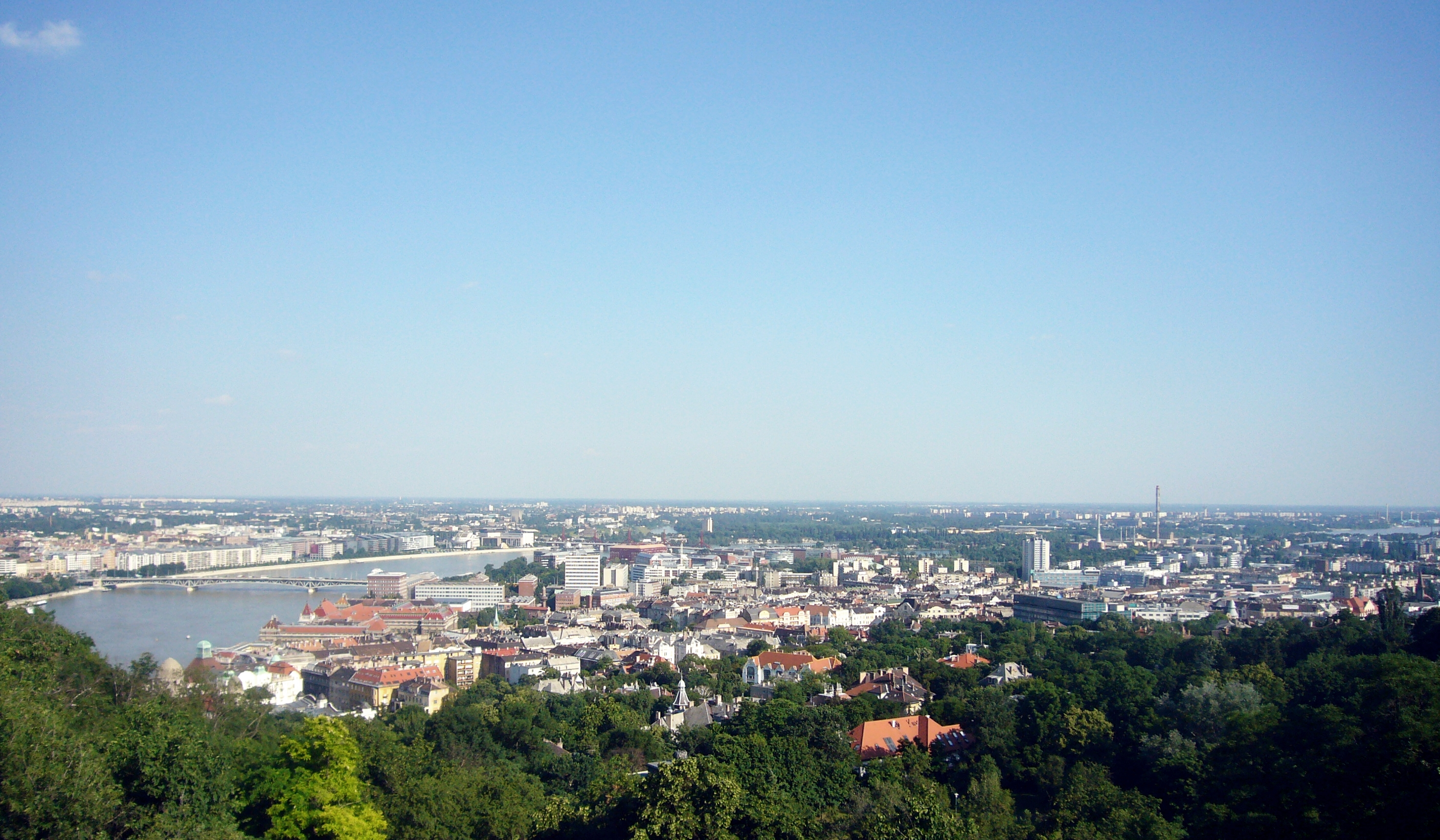 Újbuda, a Középső Ferencváros (Pesten) a Duna és a Csepel-sziget északi részének látképe a Gellért-hegyről (Budapest)